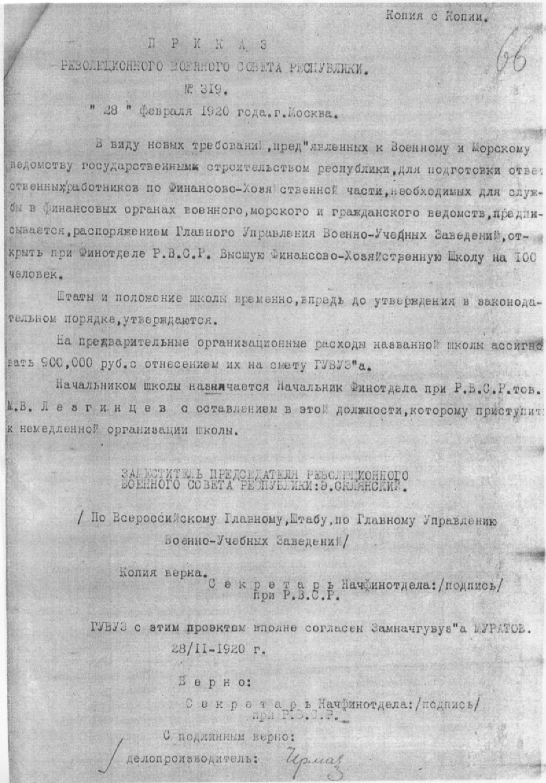 Скан копии приказа о создании школы